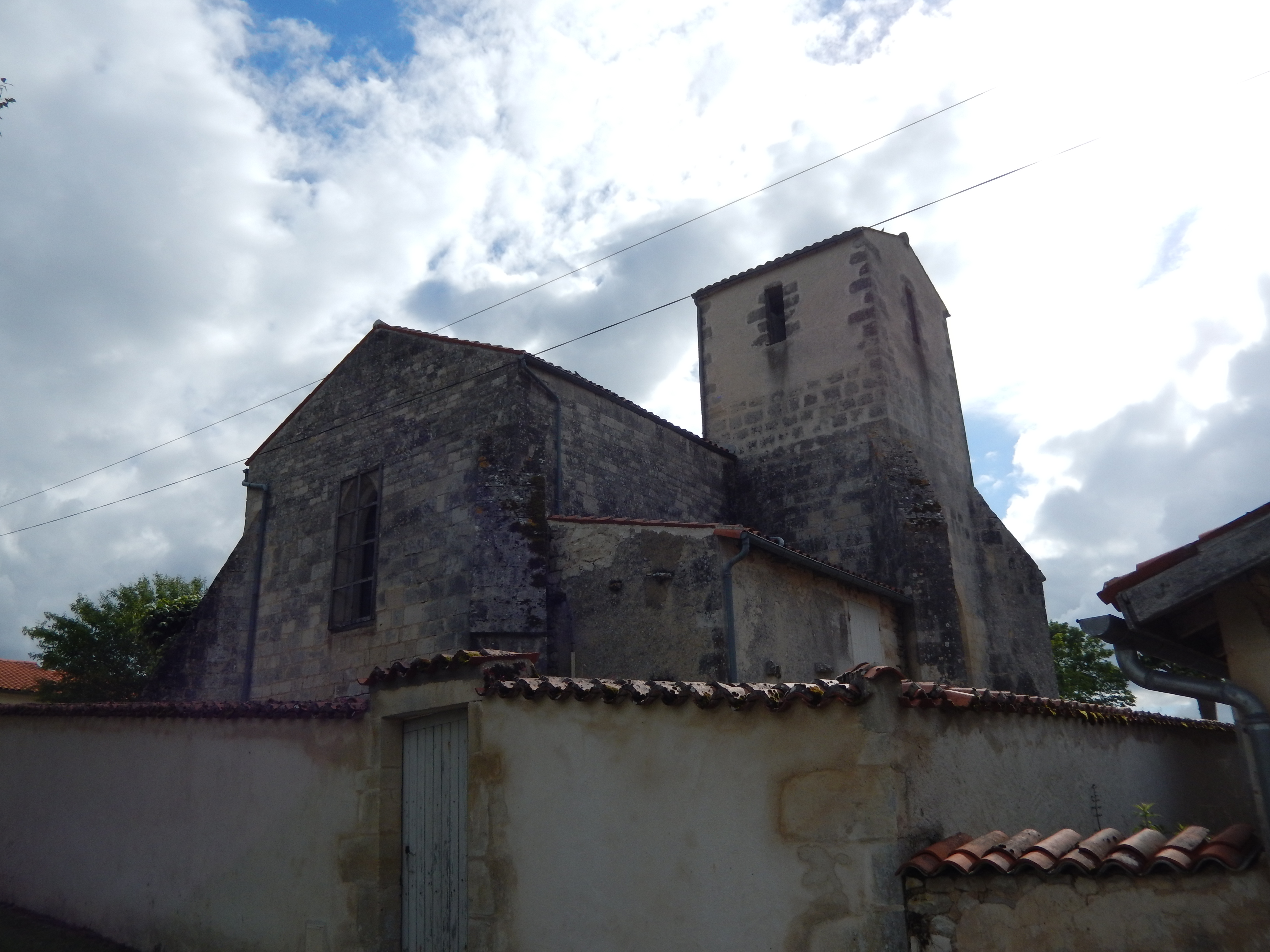 L'église de la Nativité de la Vierge, située à Ternant (Charente-Maritime, France).